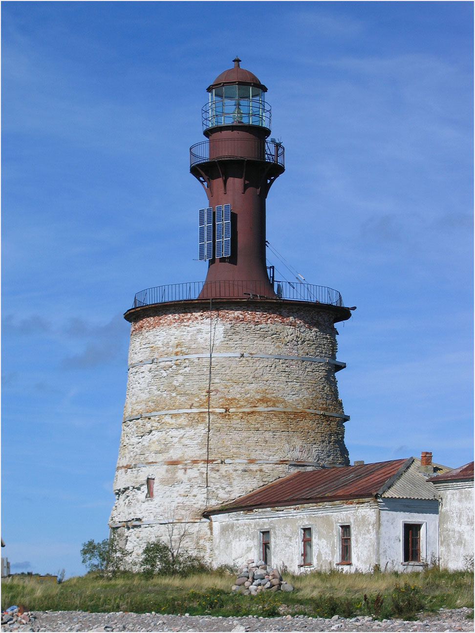 Keri tuletorn